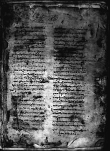 Minuscule 1187 (Gregory-Aland), folio 1 recto